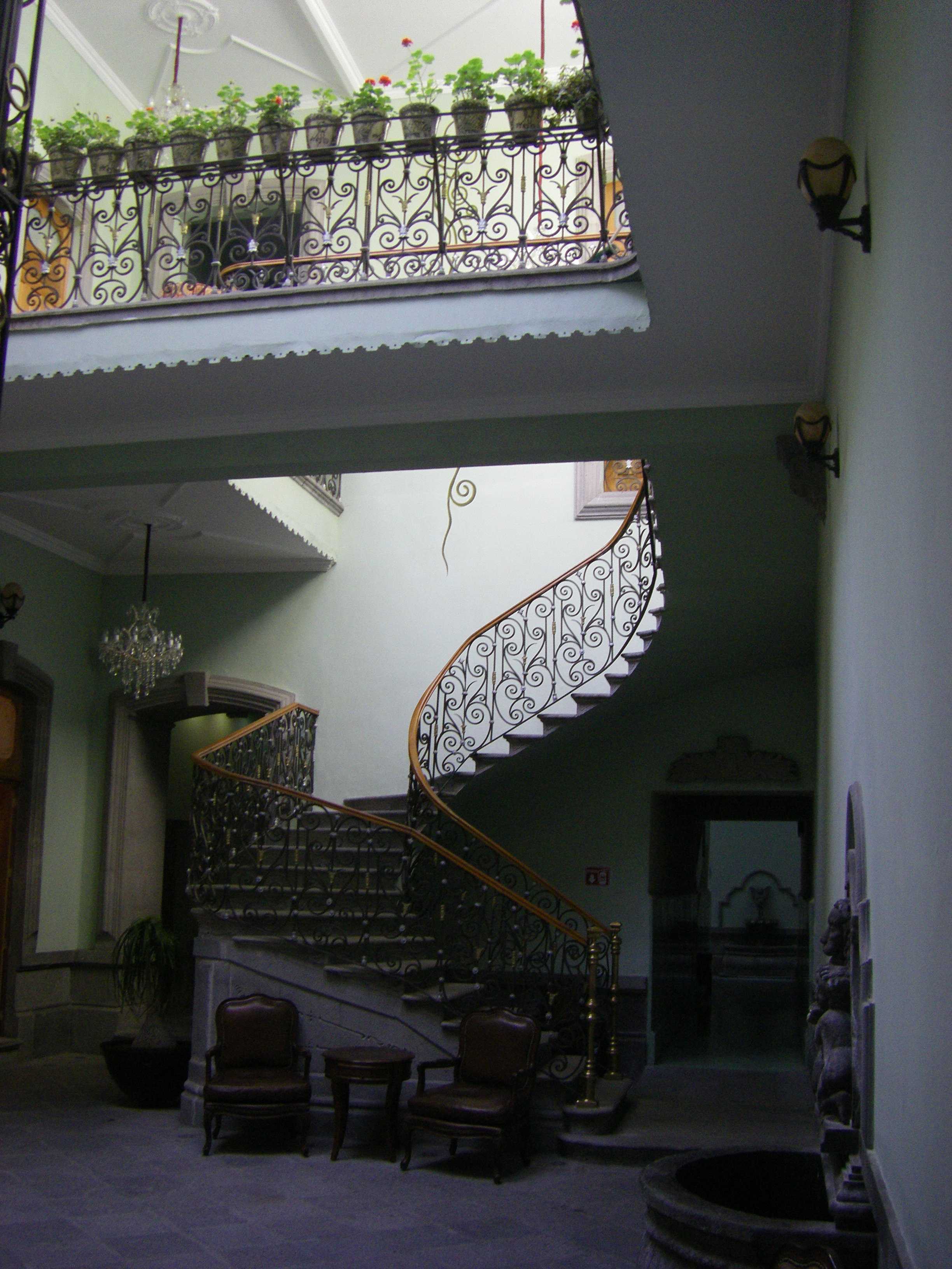 Innenhof in Puebla, Mexiko